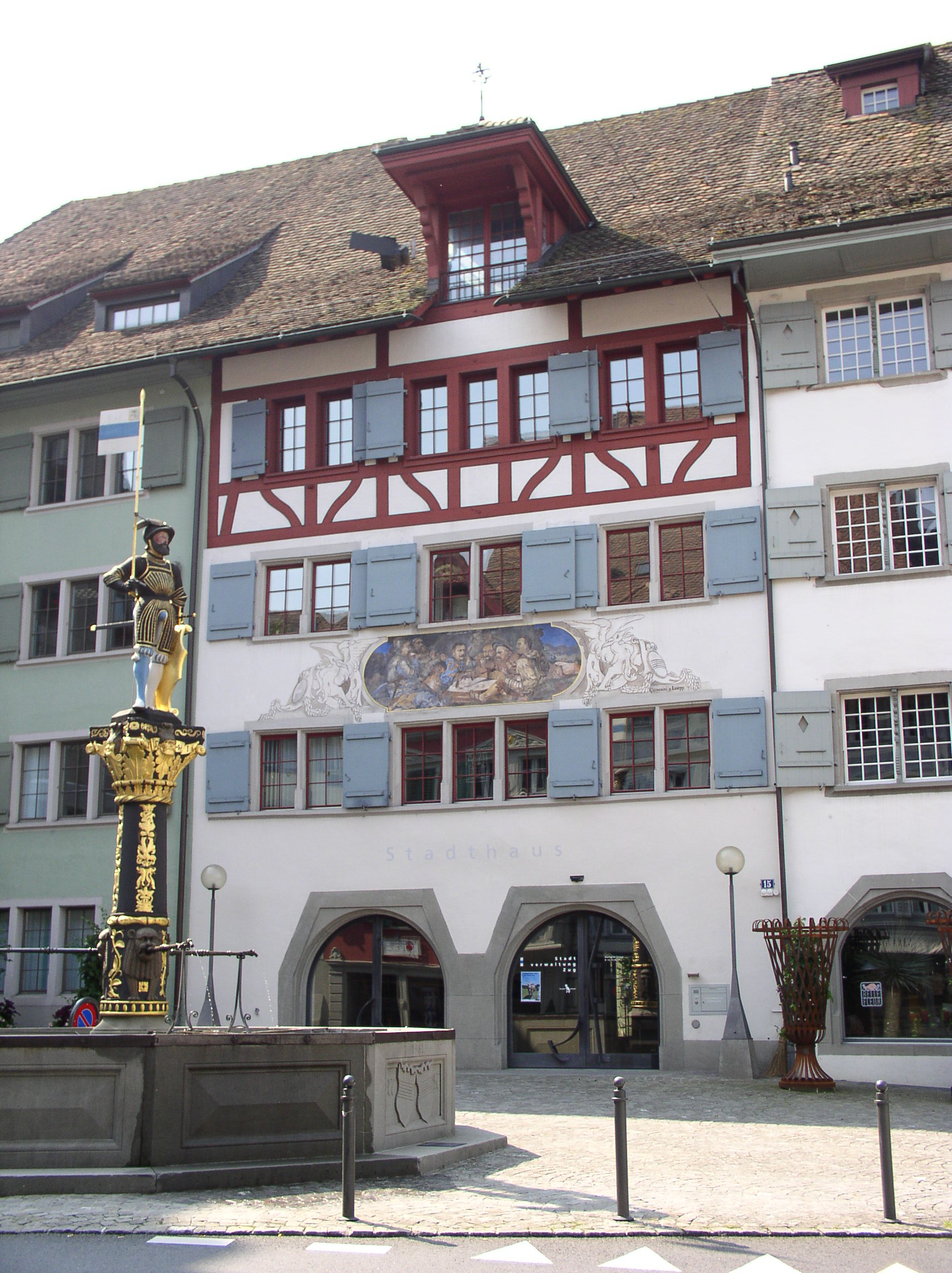 Description: Stadthaus am Kolinplatz mit dem Kolinbrunnen im Vordergrund Source: photo taken by me, July 2005 Photographer: Baikonur